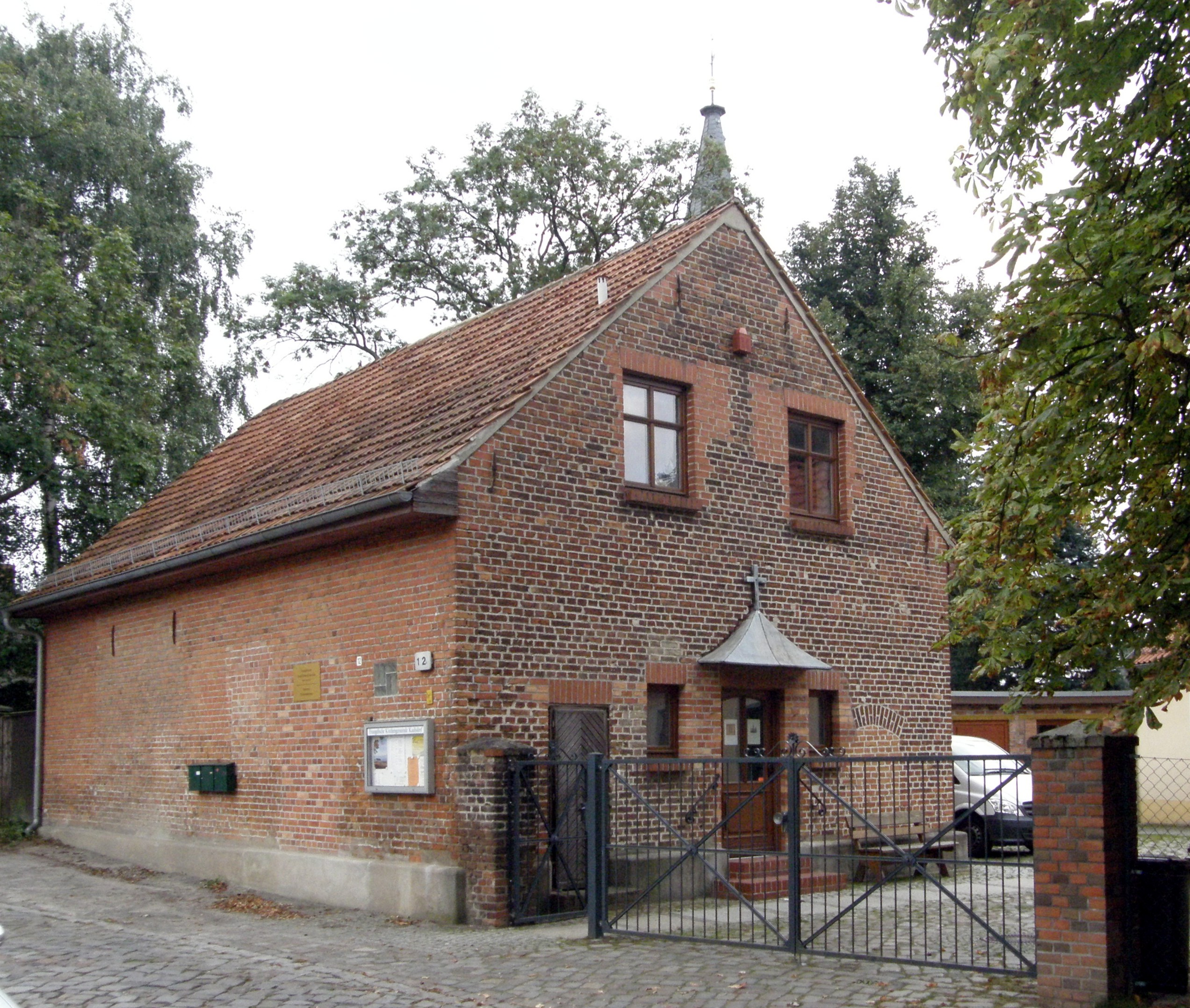 Berlin-Kaulsdorf, Pfarrhaus der Jesuskirche